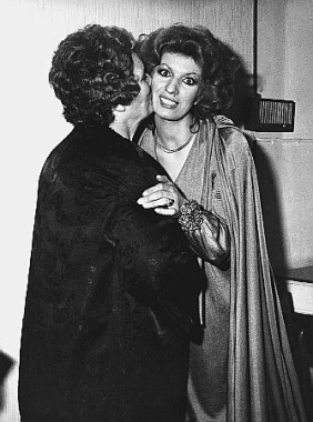 Iva Zanicchi con la madre nel 1973